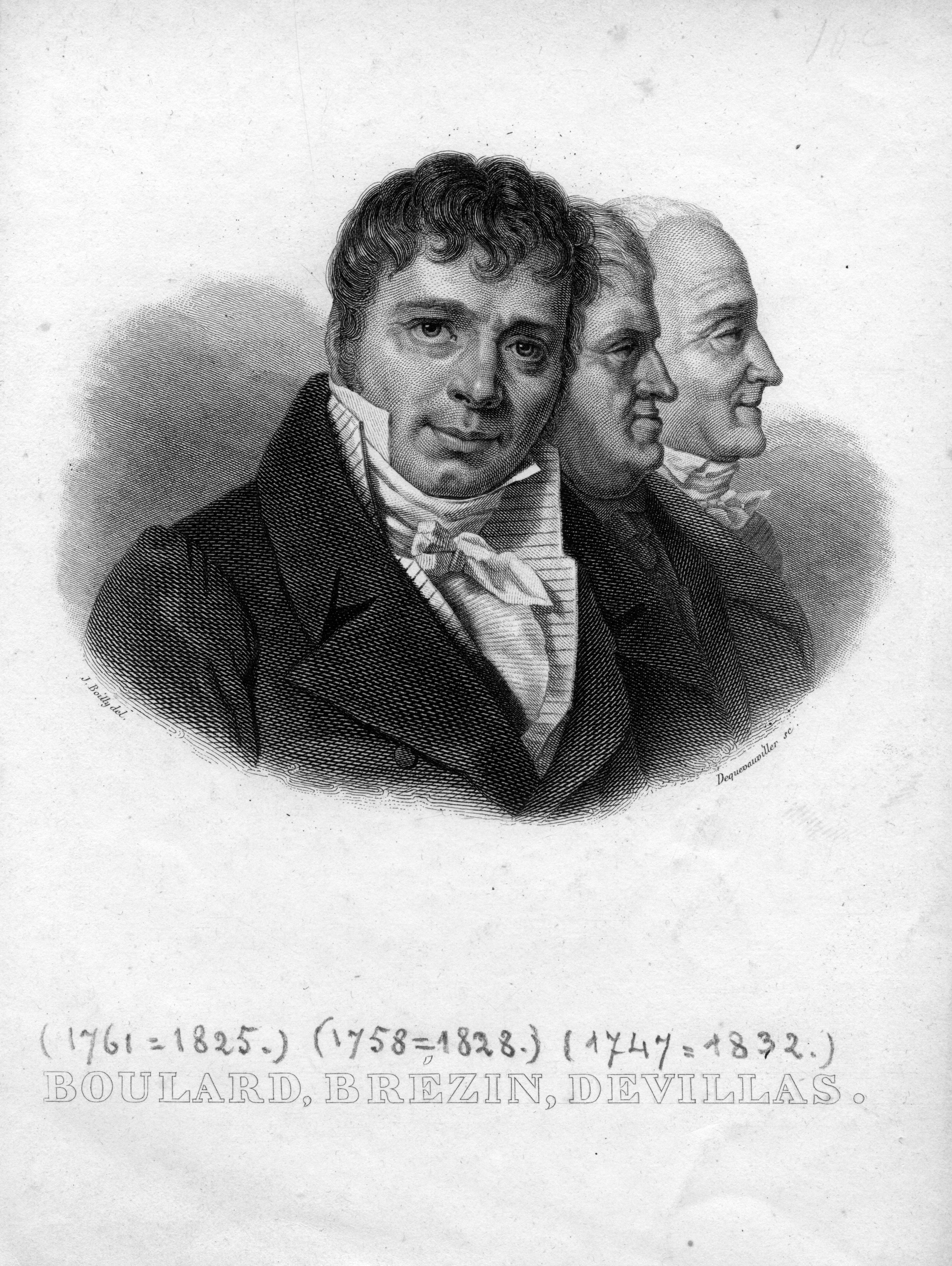 portraits gravés